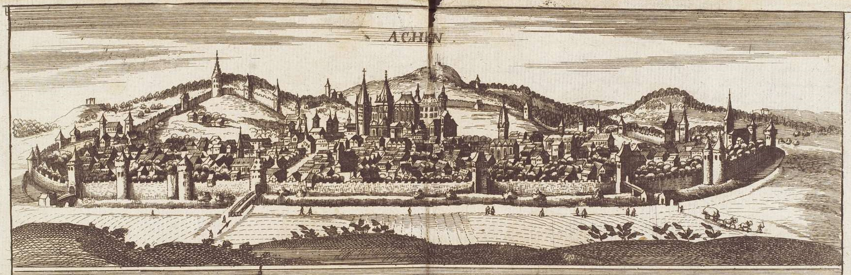 Aachen, engraving from: Martialischer Schau-Platz/ Des Lustreichen und zuglich blutigen Rhein-Strohms : Worinnen Alle Kriege/ Bataillen/ Scharmützel und Schlachten/ ... Verwüstungen/ derer Stadte/ Vestungen ... welche an beyden Ufern ... des Ober-und Nieder-Rheins/ ... bis .../ und einer ... Land-Charte ... ausgezieret, Hofmann, Nürnberg 1690